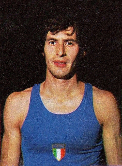 CAMPIONI dello SPORT 1973/74-Figurina n.58- DEL FORNO-ITALIA-ATLETICA LEGG.